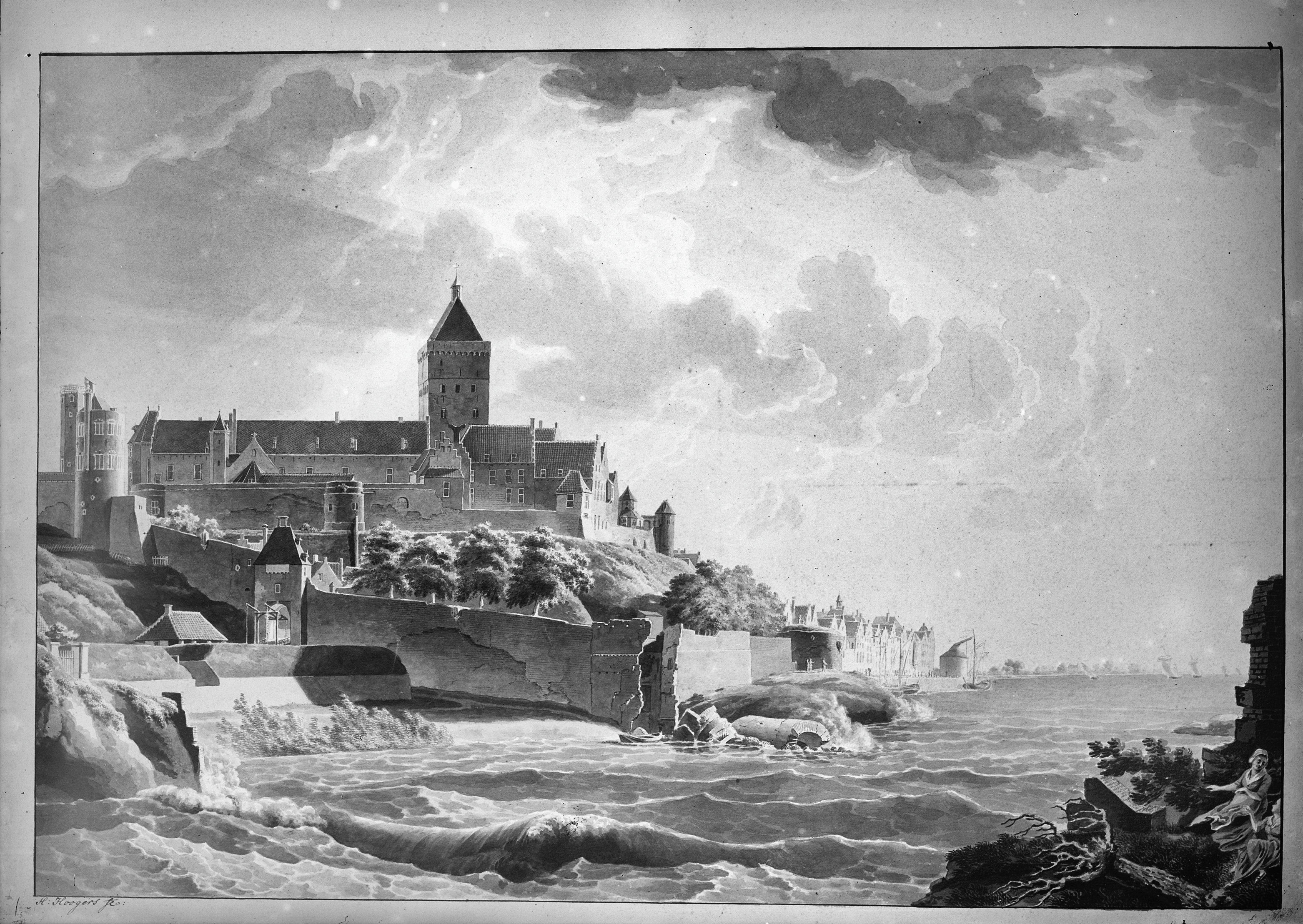 Valkhof: vanuit het oosten, naar een tekening in Oostindische inkt door H.Hoogers, 1784, in het Gemeente Museum Nijmegen